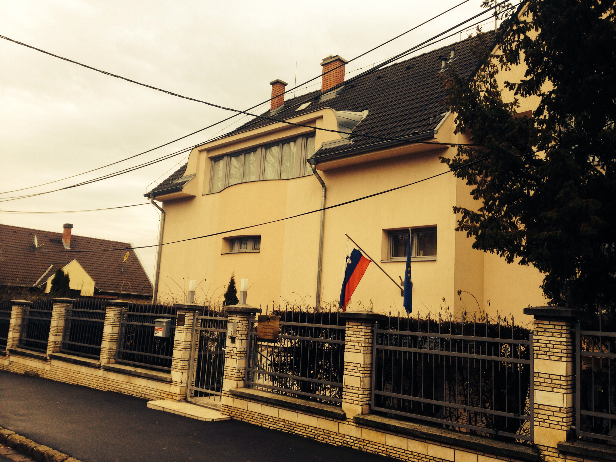 Szlovén Nagykövetség Budapesten